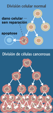 transformación cancerosa